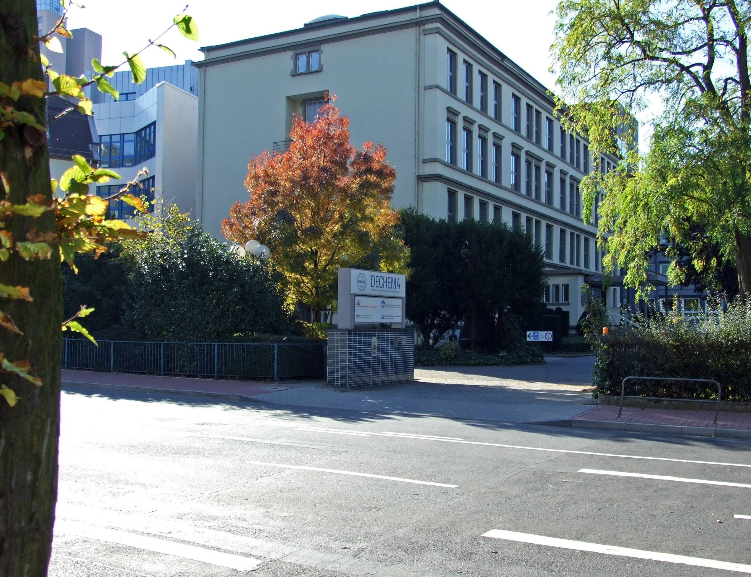 "DECHEMA" am Messegelände in Ffm, Einfahrt Varrentrappstraße